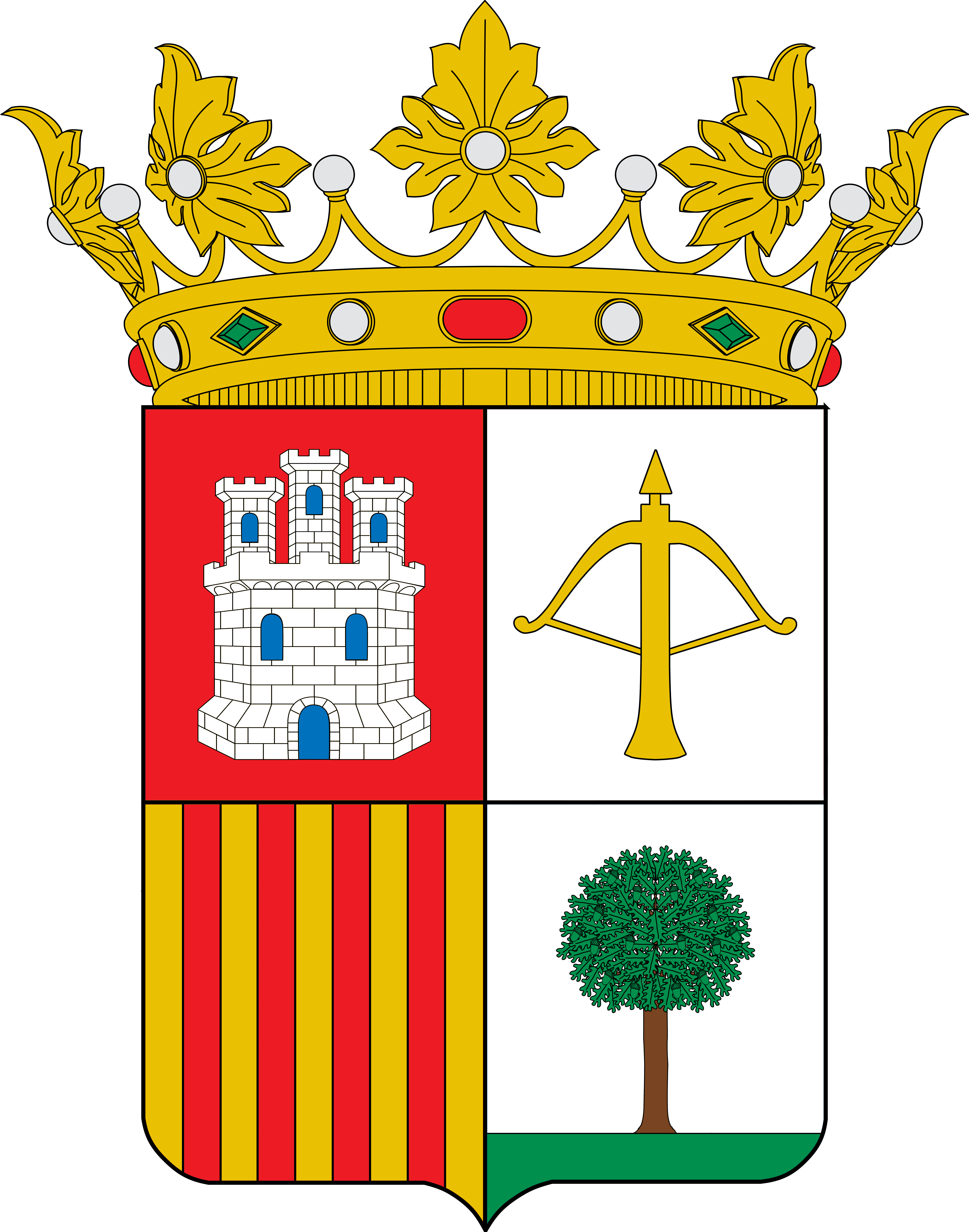 Escudo de Torralba de Aragón, provincia de Huesca